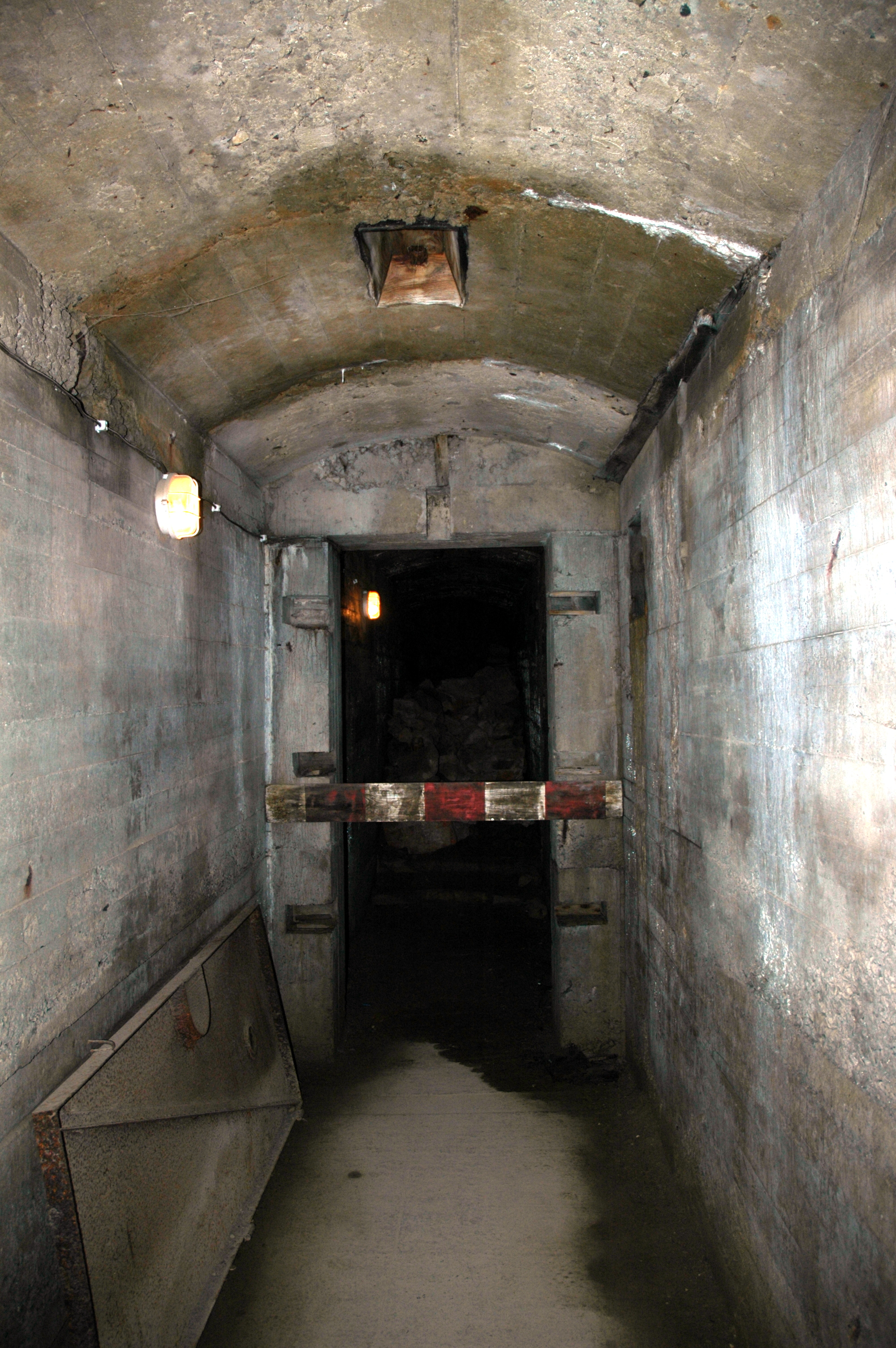 Książ:Zamek Książ w Wałbrzychu